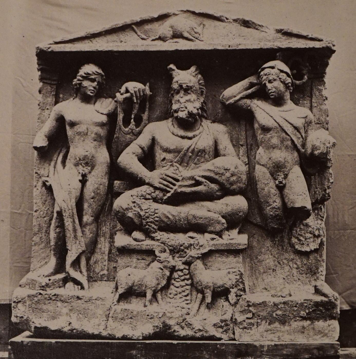 issu d'un catalogue avec des photographies de Trompette